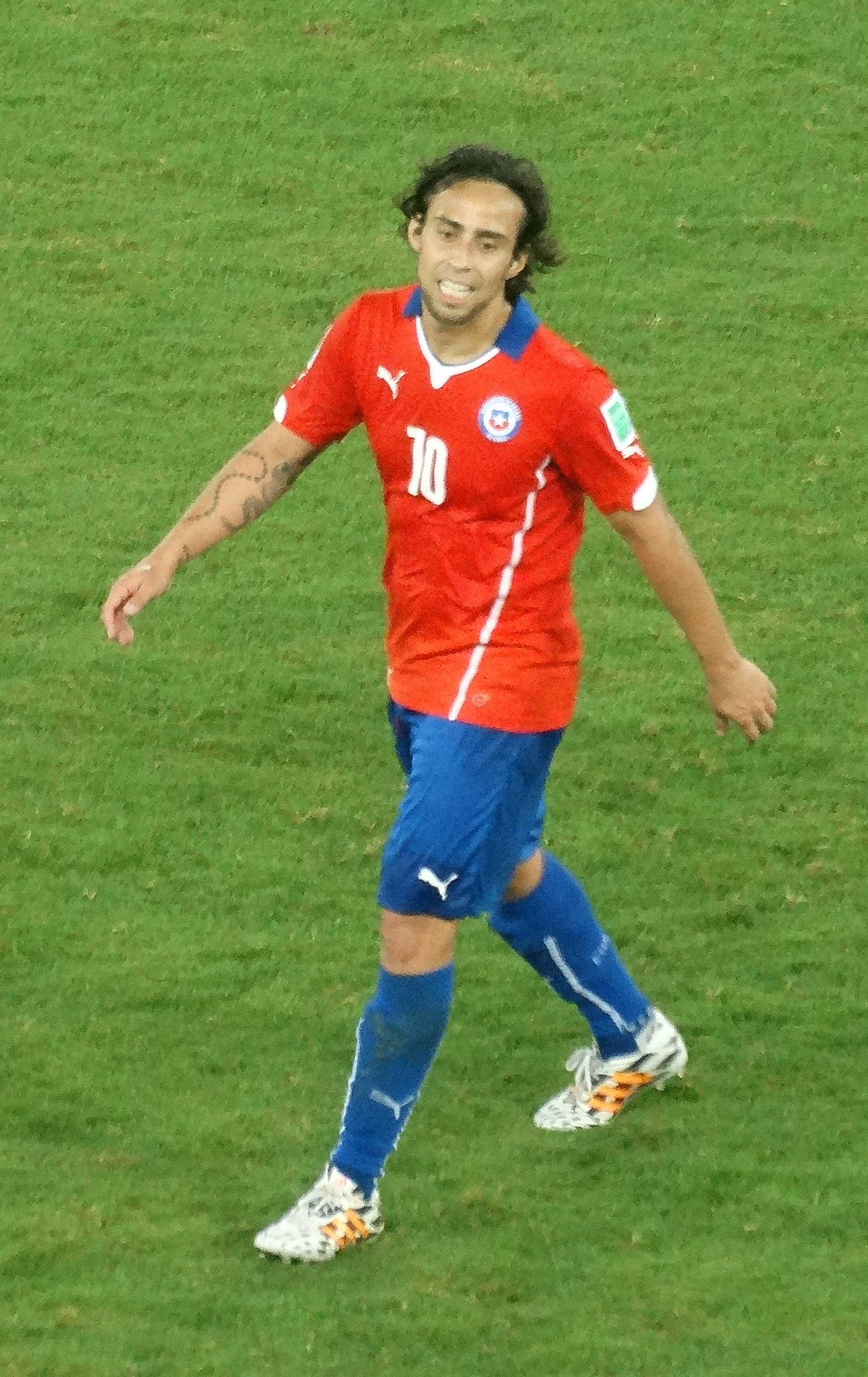 Valdívia atuando com a camisa do Chile